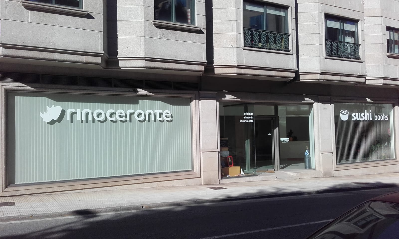 Rinoceronte Editora